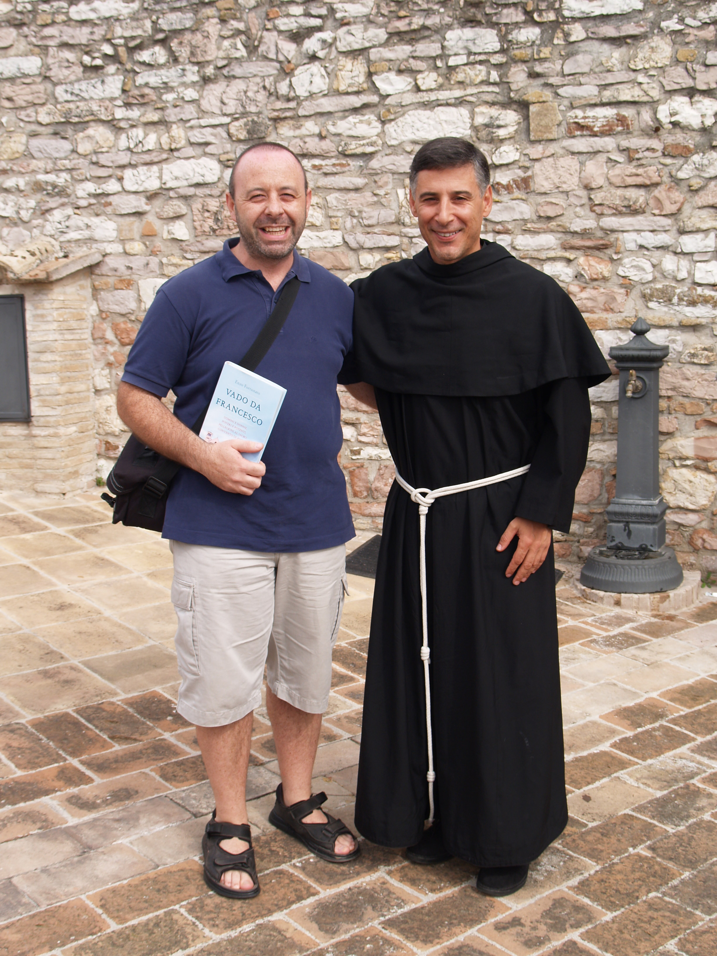 incontro di Cristian Bonaldi con padre Enzo Fortunato, frate minore conventuale, portavoce sala stampa Basilica S. Francesco, Assisi